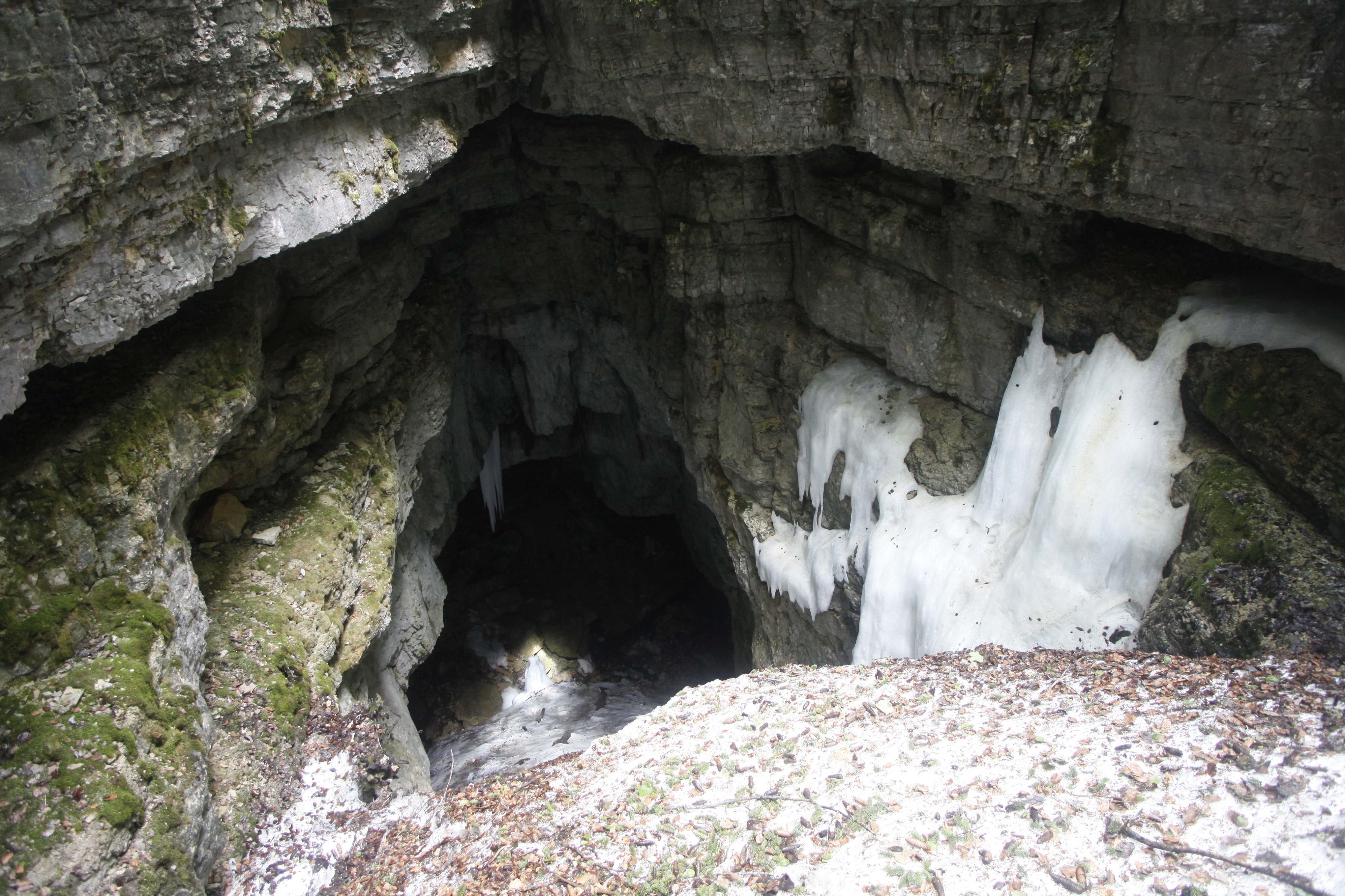 Entrée de la glacière du pré de Saint-Livres.